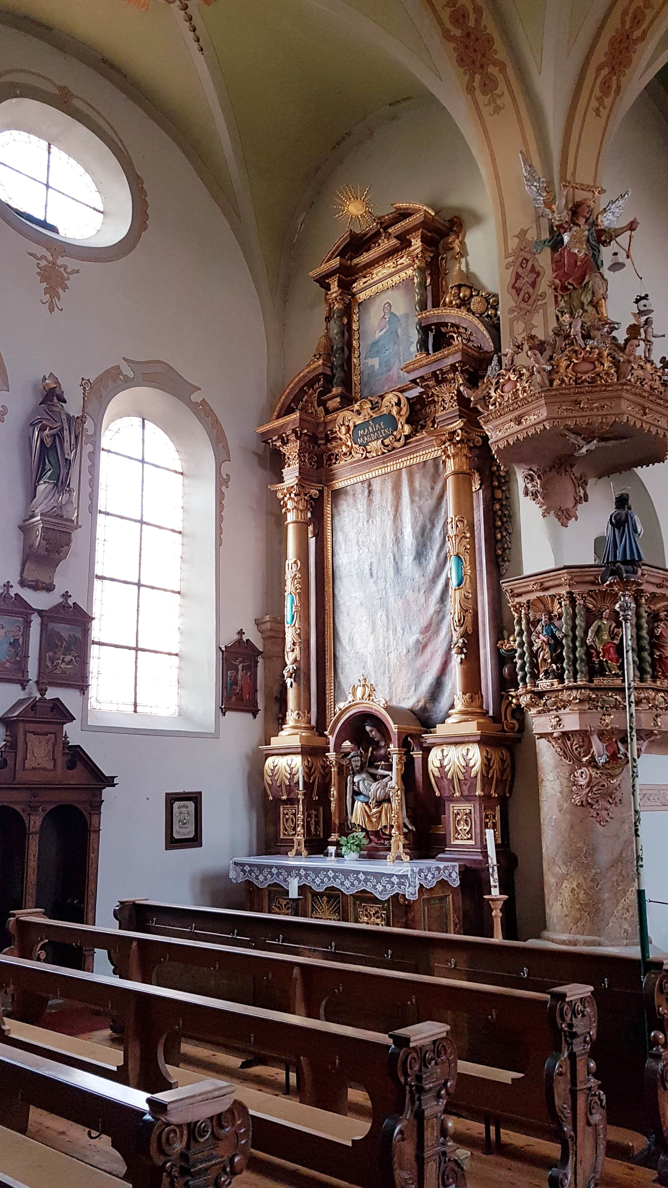 Hörmannshofen (Biessenhofen), Wallfahrtskirche St. Ottilia, Blick in den linken Langhaus-Querarm.